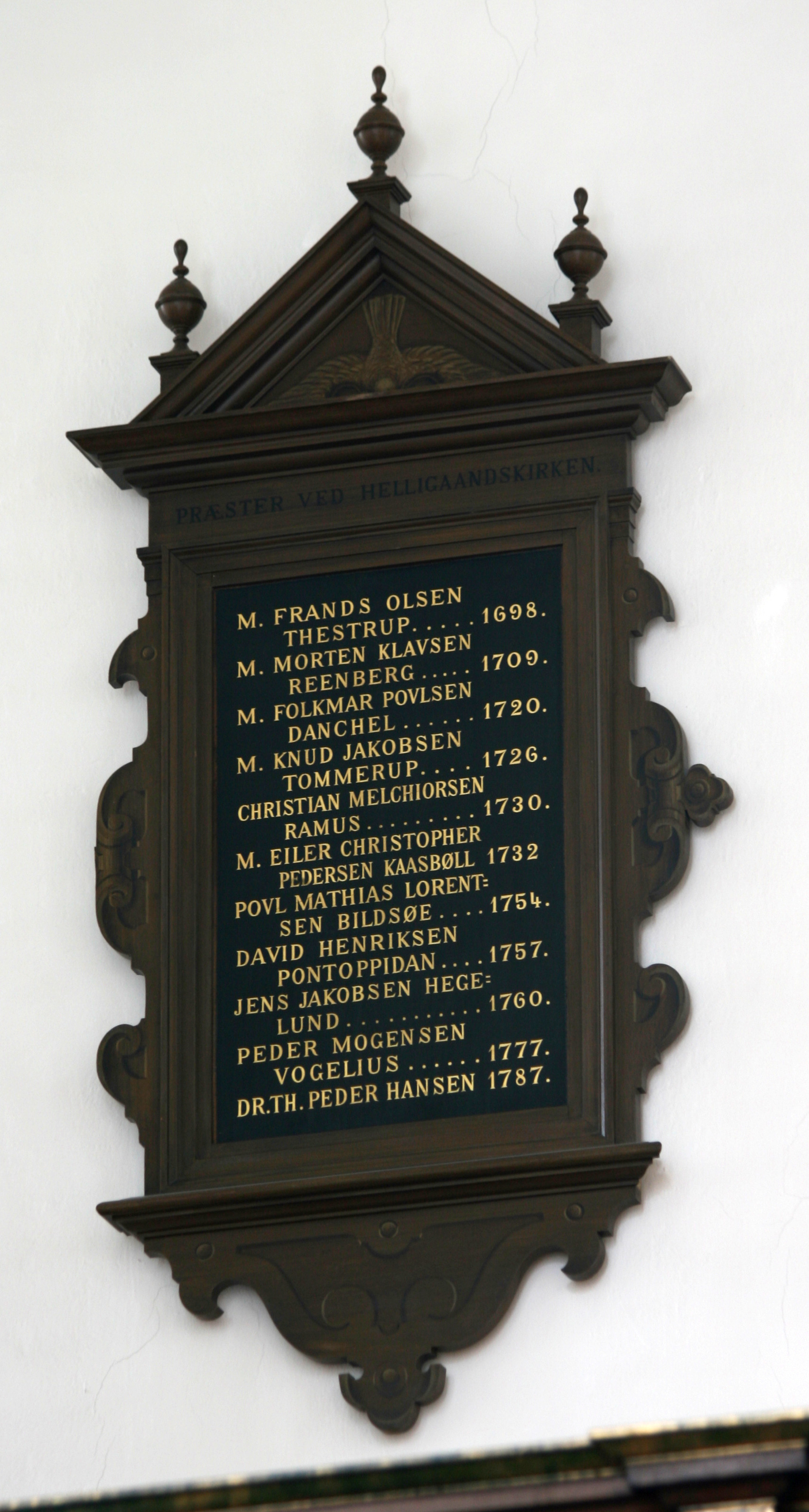 Helligåndskirken, Copenhagen, Denmark. Series pastorum, part 3. 1698-1787.